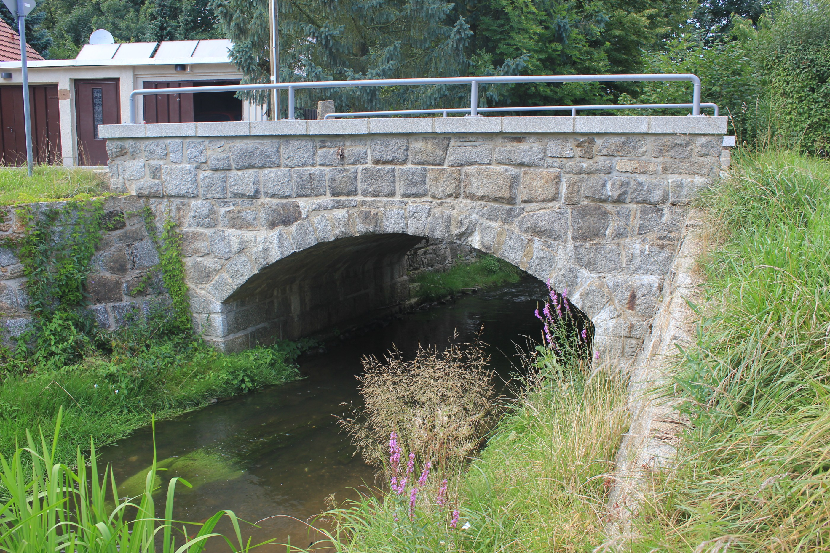 Hornjoserbsce: Móst přez Dołhu wodu w Darinje